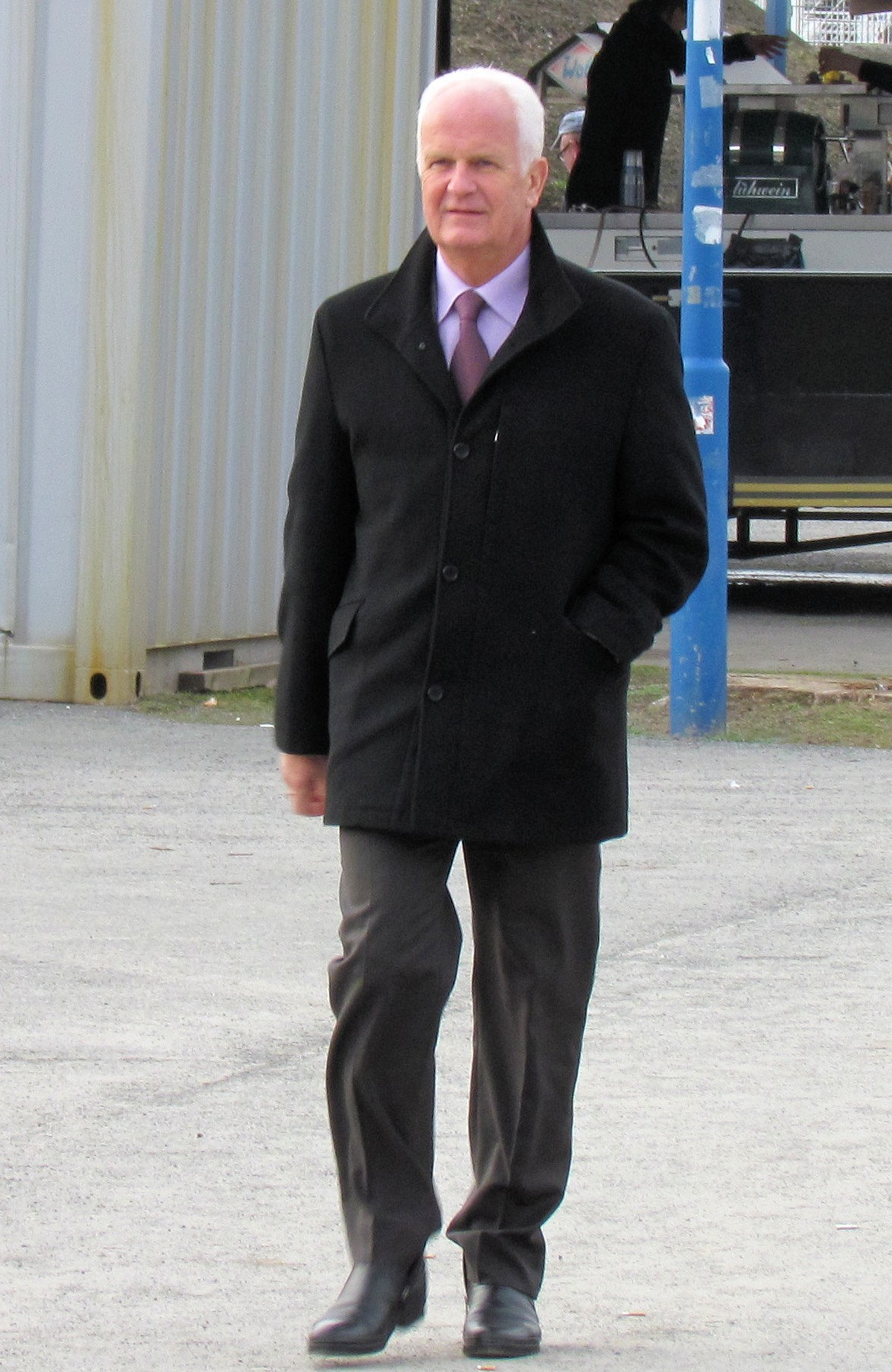 Bernd Stange im März 2012 im Jenaer Ernst-Abee-Sportfeld nach dem Besuch des Drittligaspiels FC Carl Zeiss Jena gegen Rot-Weiss Oberhausen